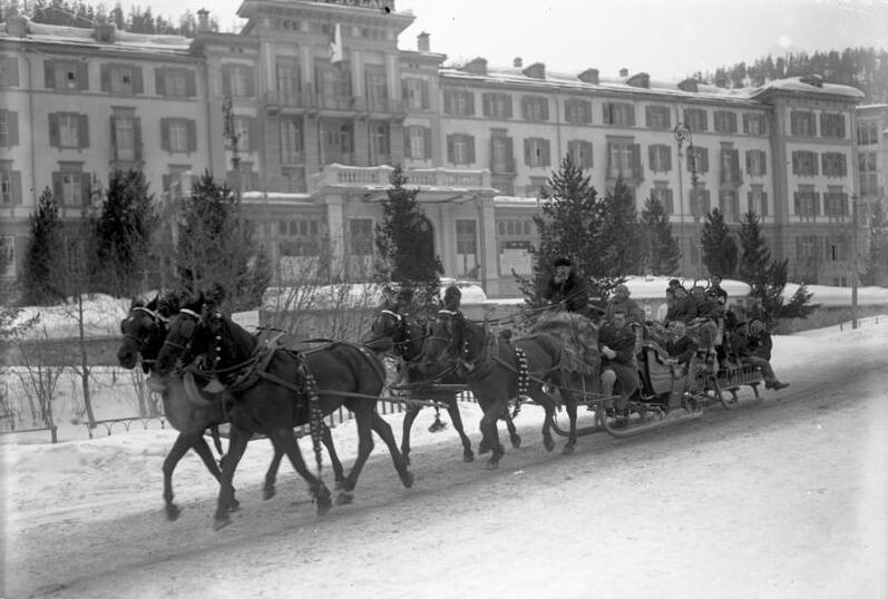 Hochbetrieb in St. Moritz! Im Vierergespann fahren die Wintersportler von den grossen Hotels zu den Sportplätzen.